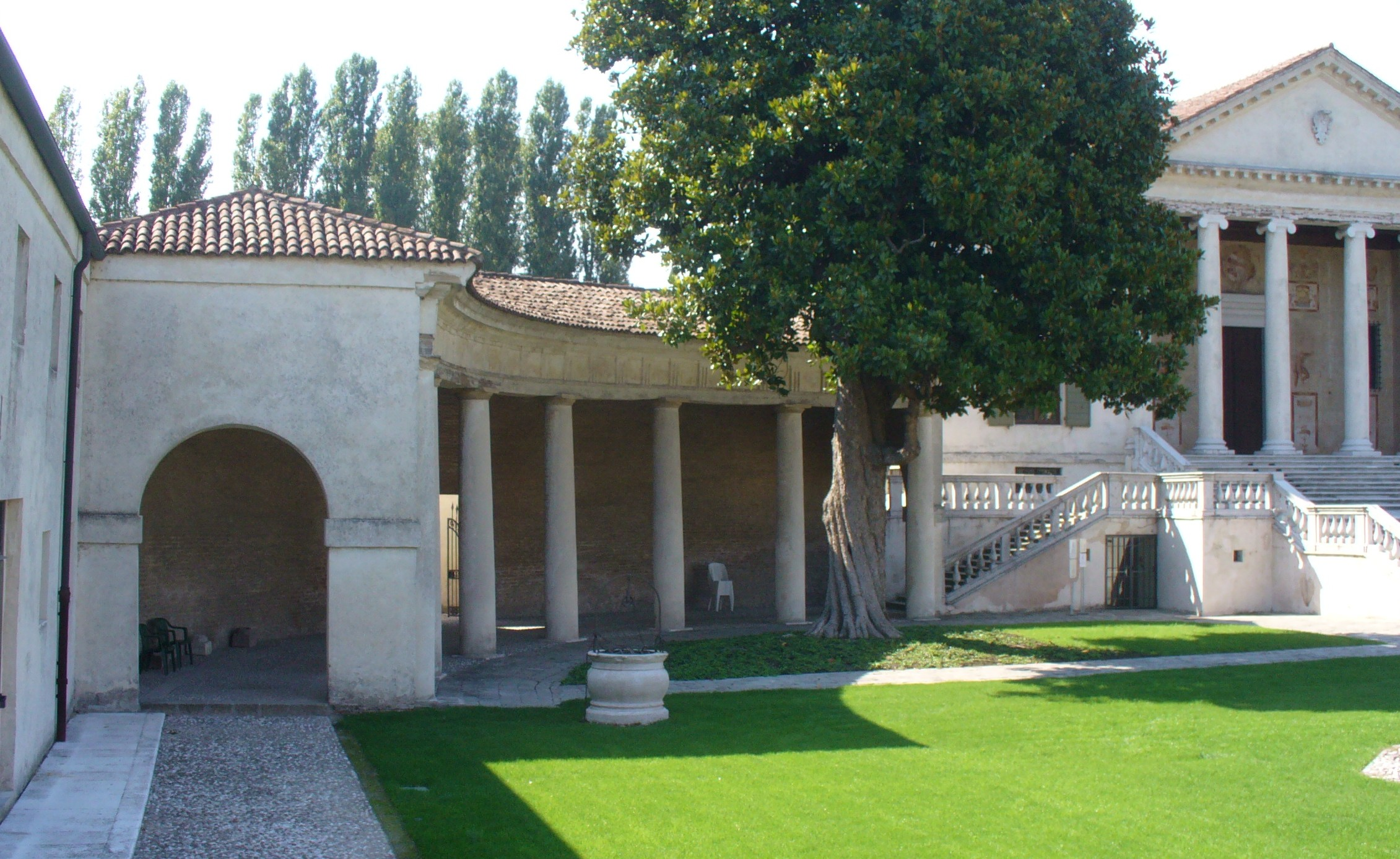 Villa Badoer by Andrea Palladio, Fratta Polesine.